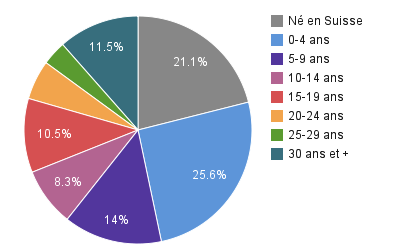 Proportion des étrangers par durée de résidence en 2009. (su-f-01.03.01.01.25)